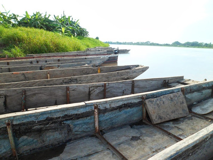 Puerto de las Canoas en el corregimiento de San José de Menchiquejo, del municipio de San Fernando de Occidente, en el departamento de Bolívar.